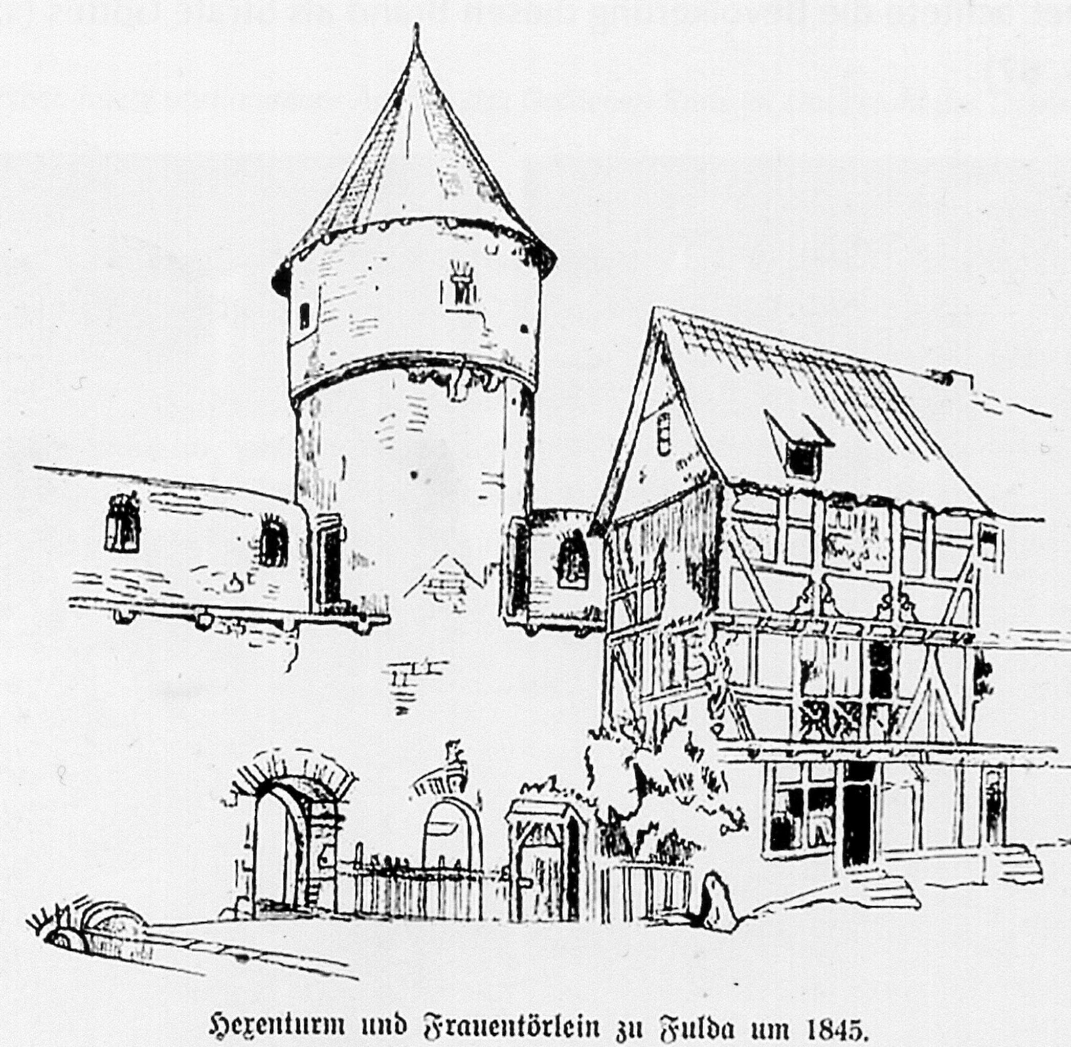 Fulda - Frauentörleins - 1845